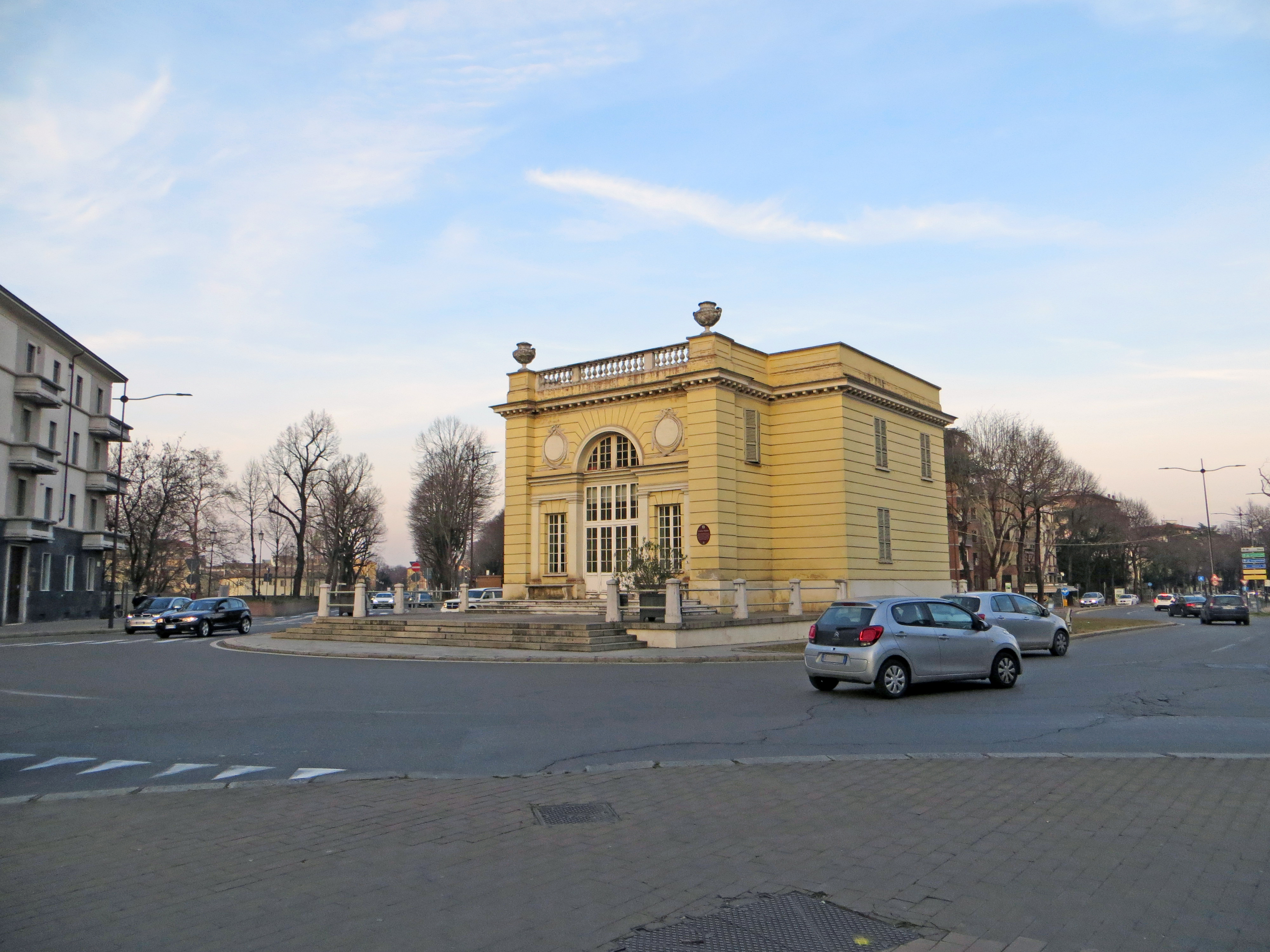 Casinetto Petitot (Parma) - facciata e lato sud